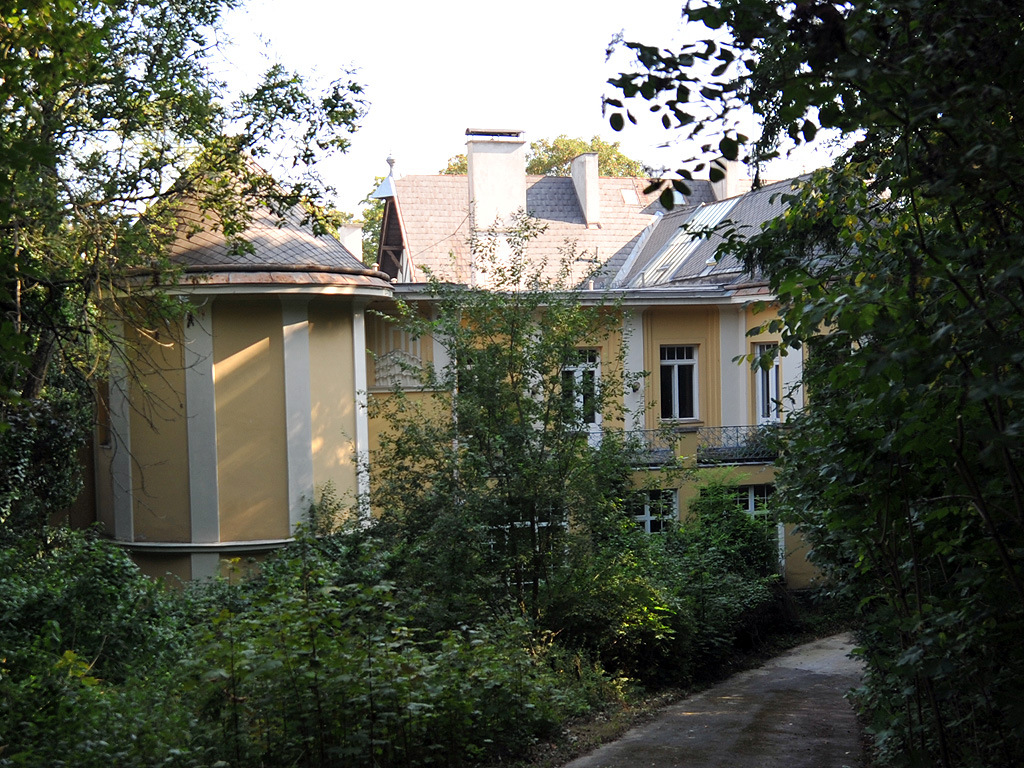 Purkersdorf: Villa Zuckerkandl II; Japanisches Museum